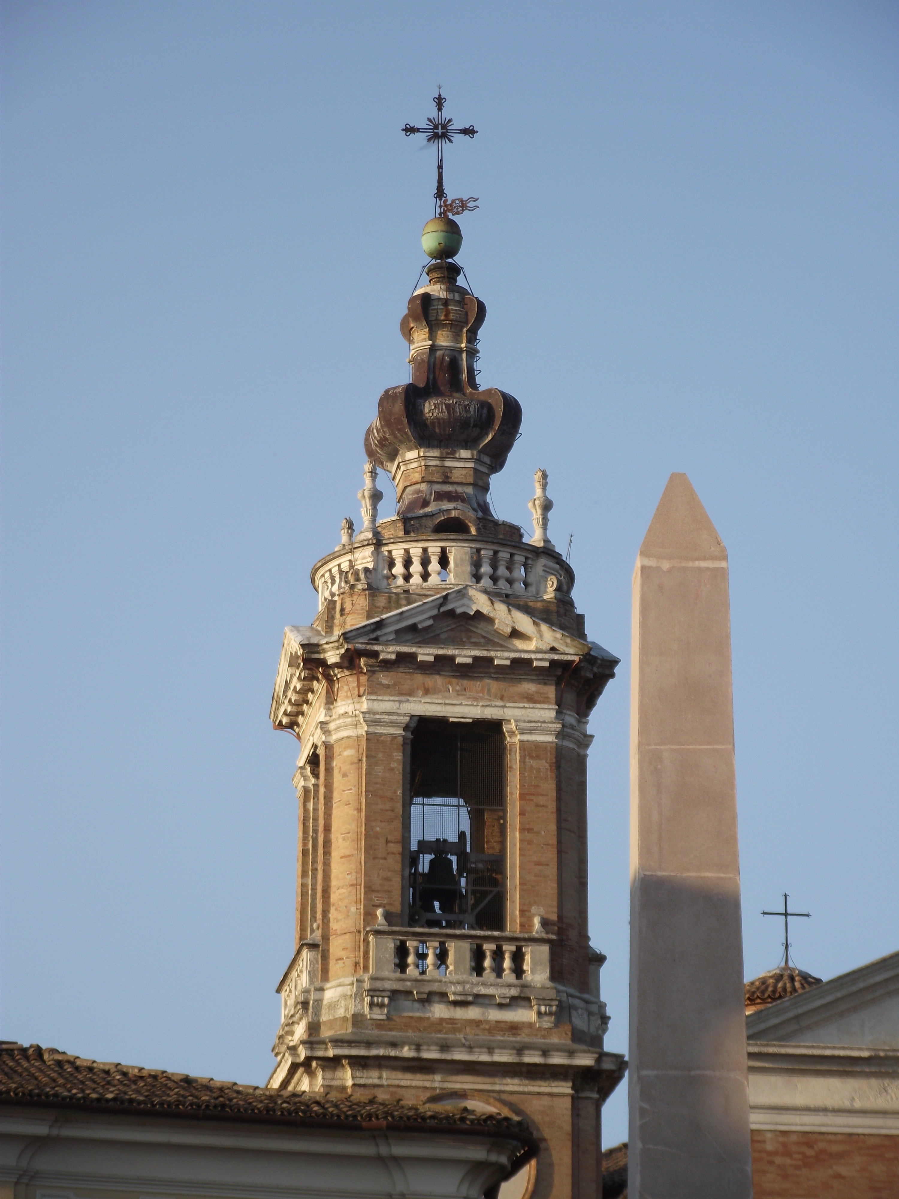 Campanile del Duomo